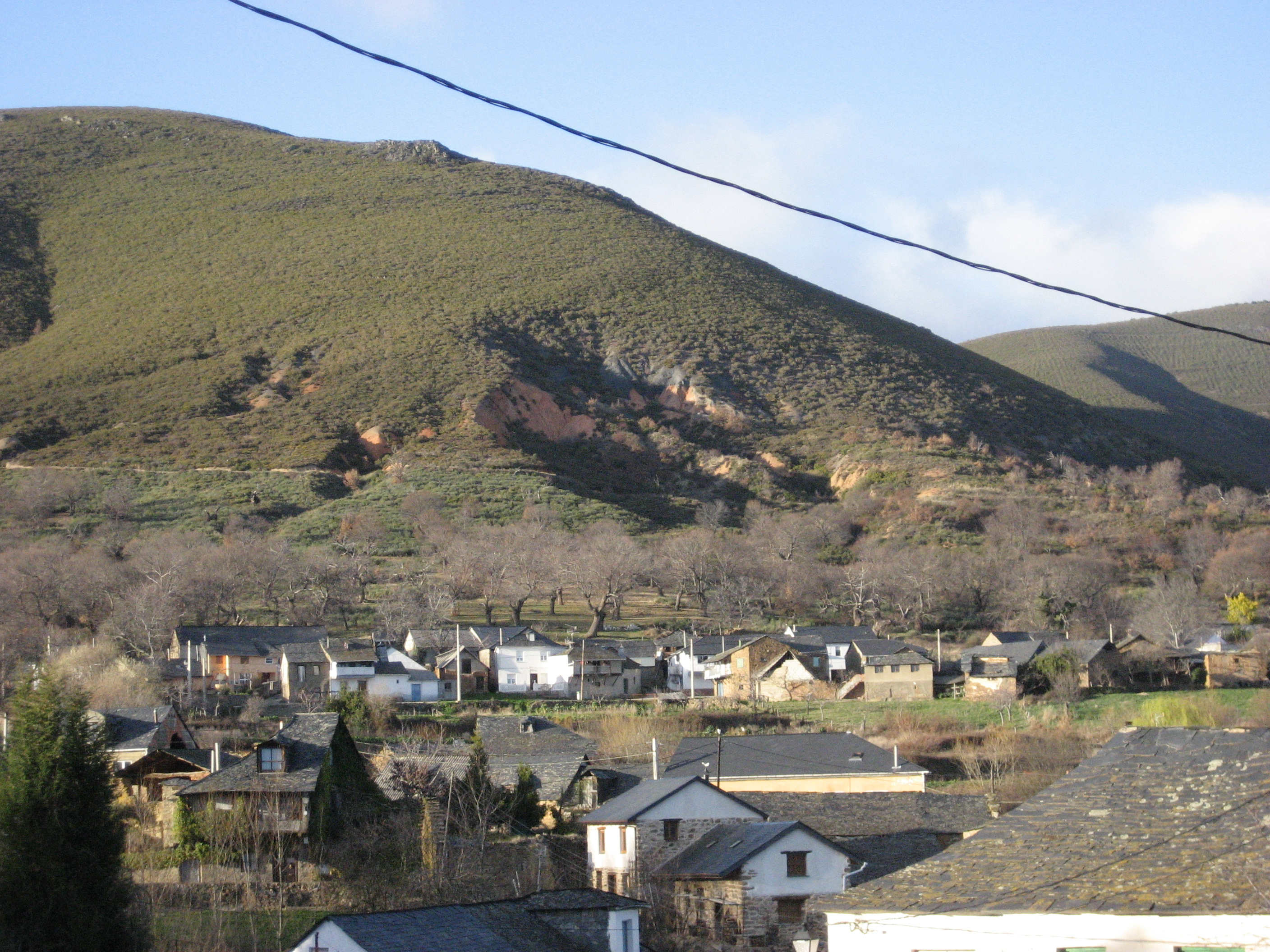 Pueblo de Villar de las Traviesas (El Bierzo, León, España) con las explotaciones auríferas romanas al fondo